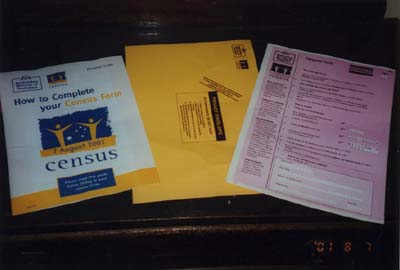 オーストラリア国勢調査2001